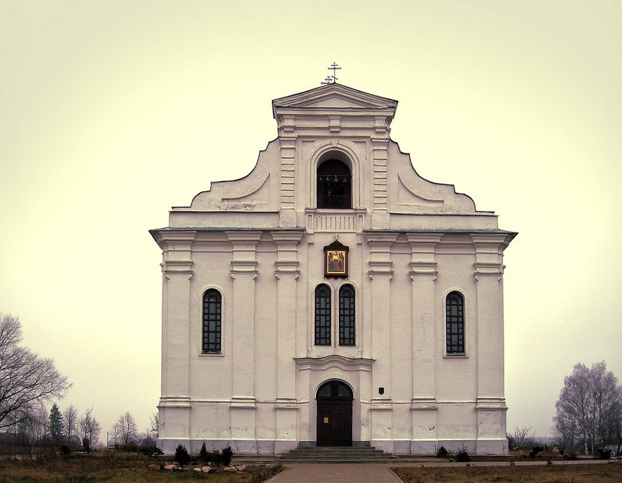 Беларуская (тарашкевіца): Былы манастыр базылян: Благавешчанская царква, манастырскі корпус. в. Малыя Ляды This is a photo of Belarusian heritage monument. Reference number: 612Г000579 ( WLM)